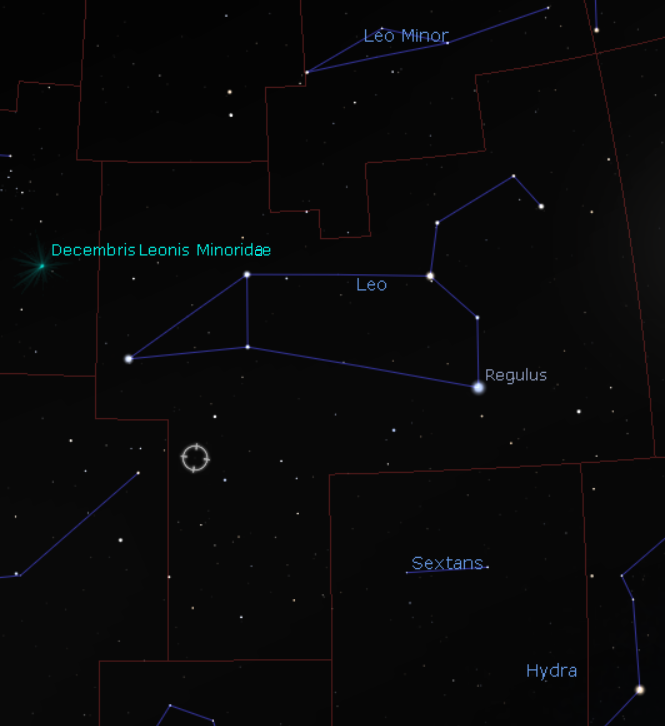 Stellae K2-18 locus